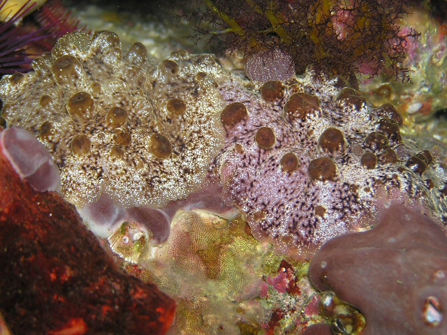 Actinocyclus papillatus, a 4 m, en el Parque Marino de Izu, Japón